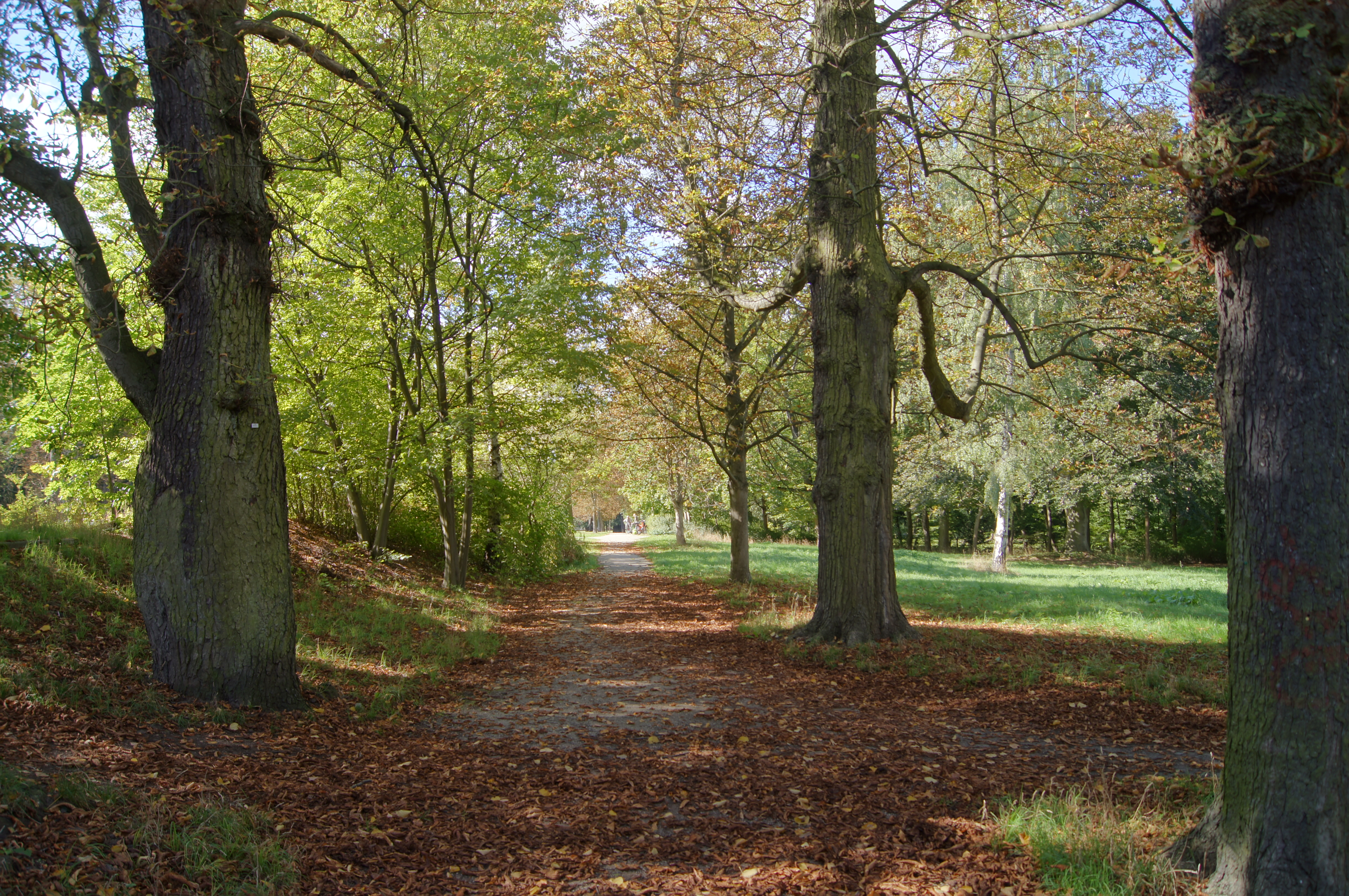 Schlosspark Berlin-BuchThis is a photograph of an architectural monument.